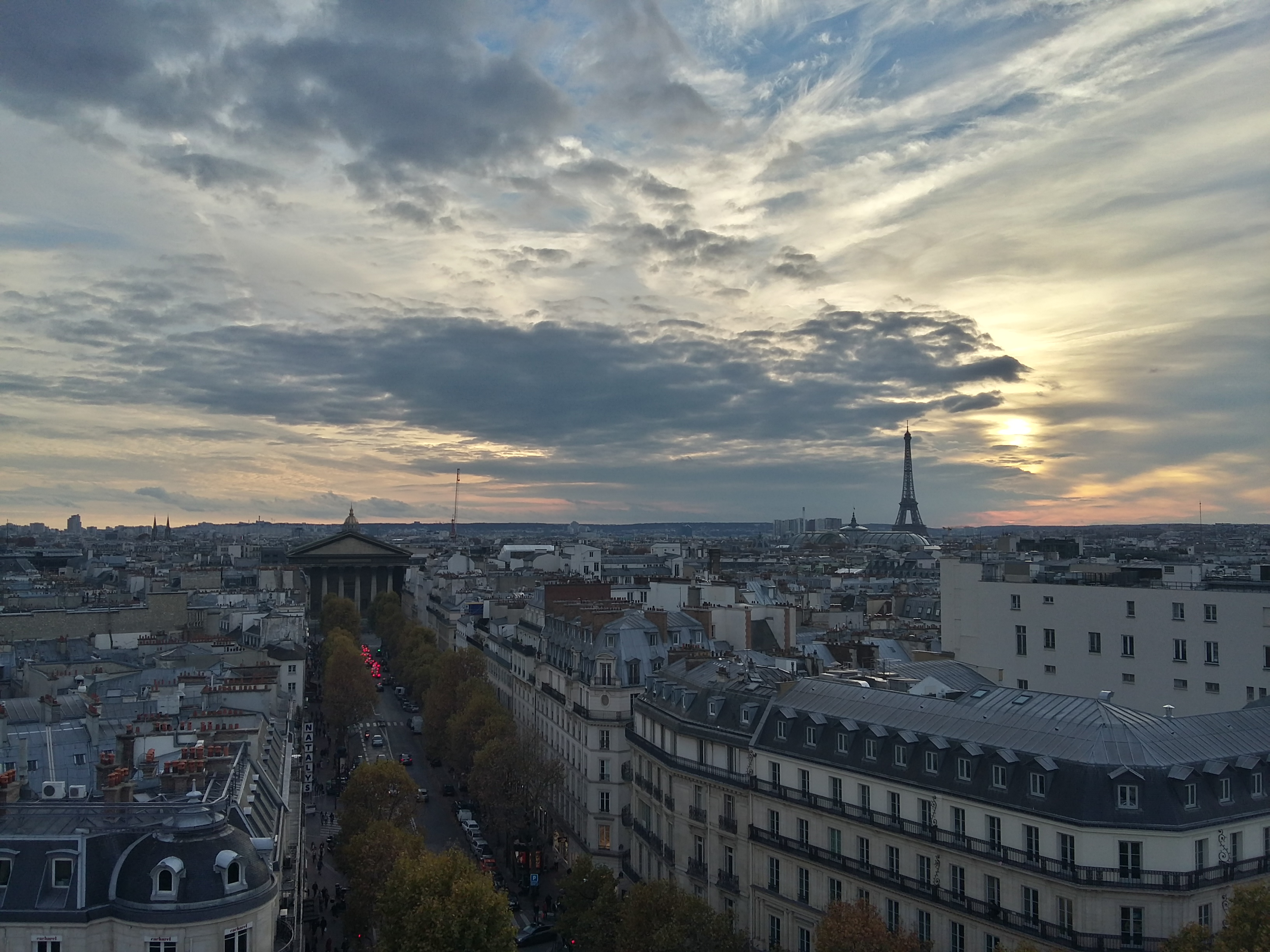 Vue sur les toits de Paris